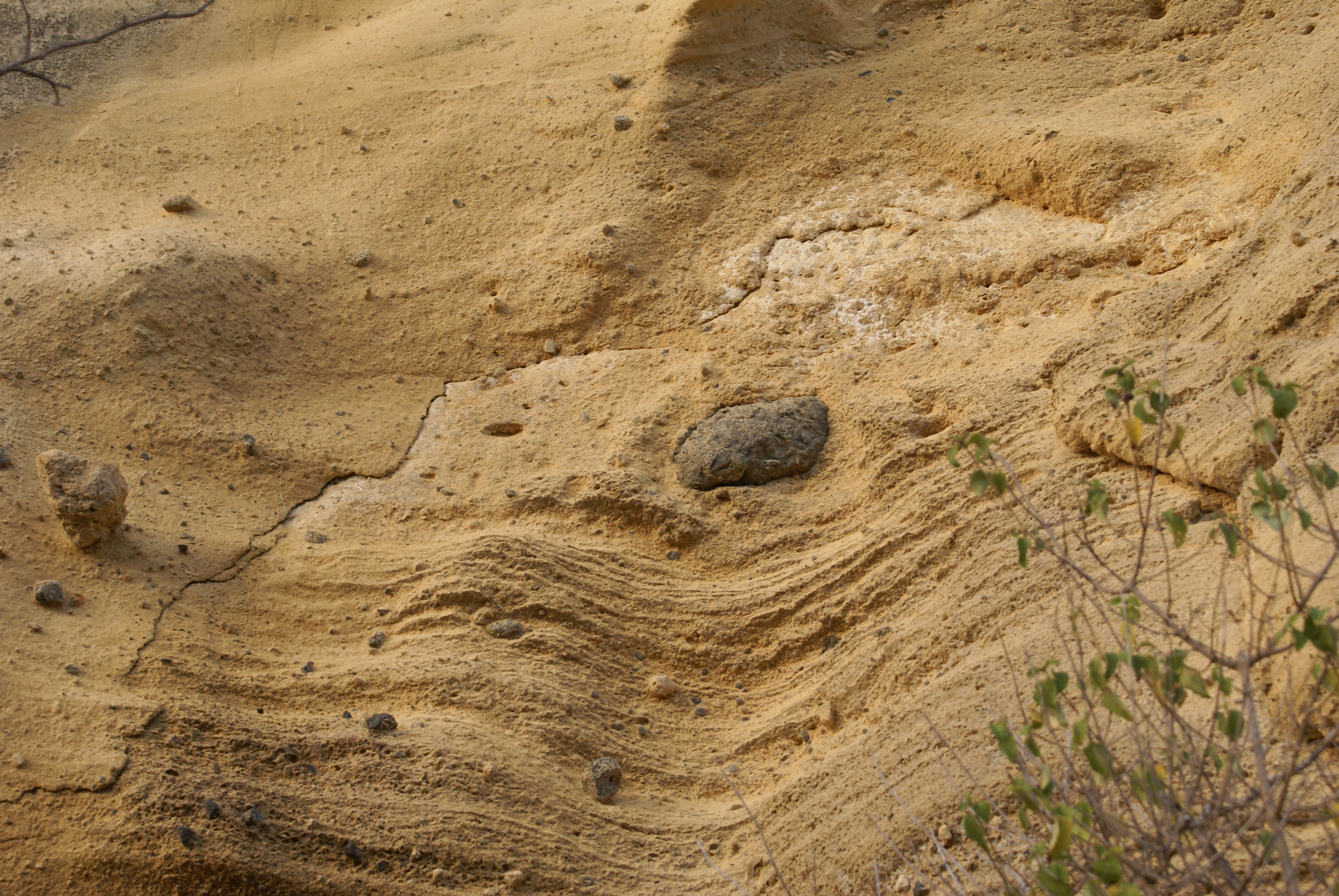 Détail de la falaise de palagonite de la plage de Moya à Mayotte (Petite-Terre) montrant la superposition des couches de retombées et les inclusions de blocs de basalte et de corail